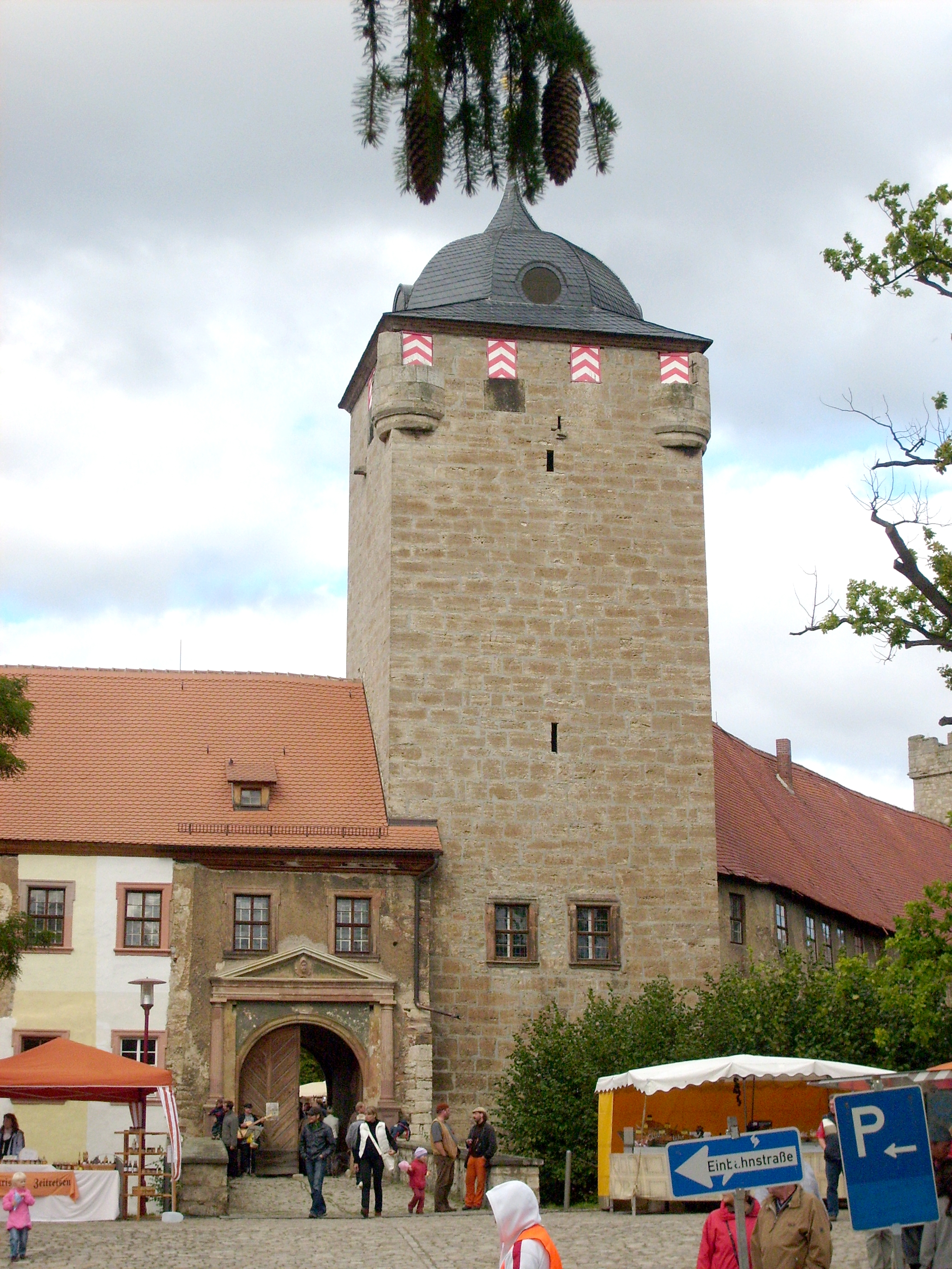 Wasserburg Kapellendorf - Kapellendorf, Weimarer Land, Thüringen, Deutschland